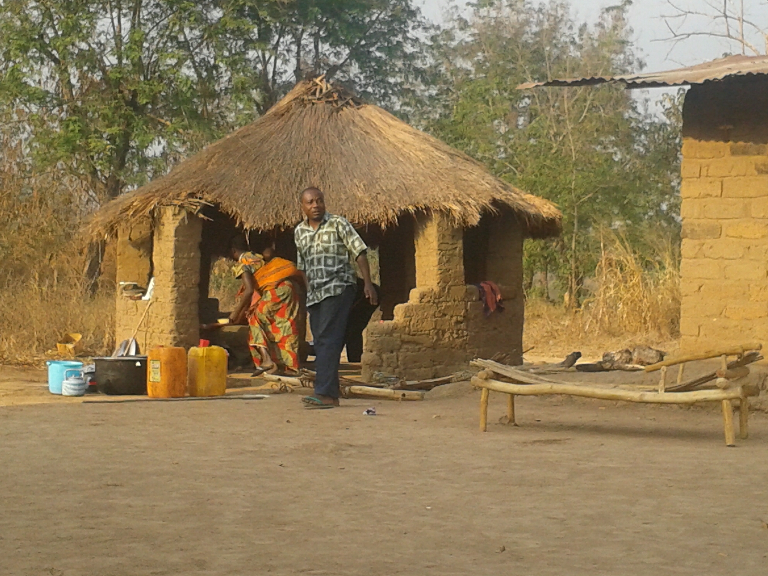 Maison de stockage des produits agricoles d'une famille This is an image of Cultural Fashion or Adornment from Central African Republic